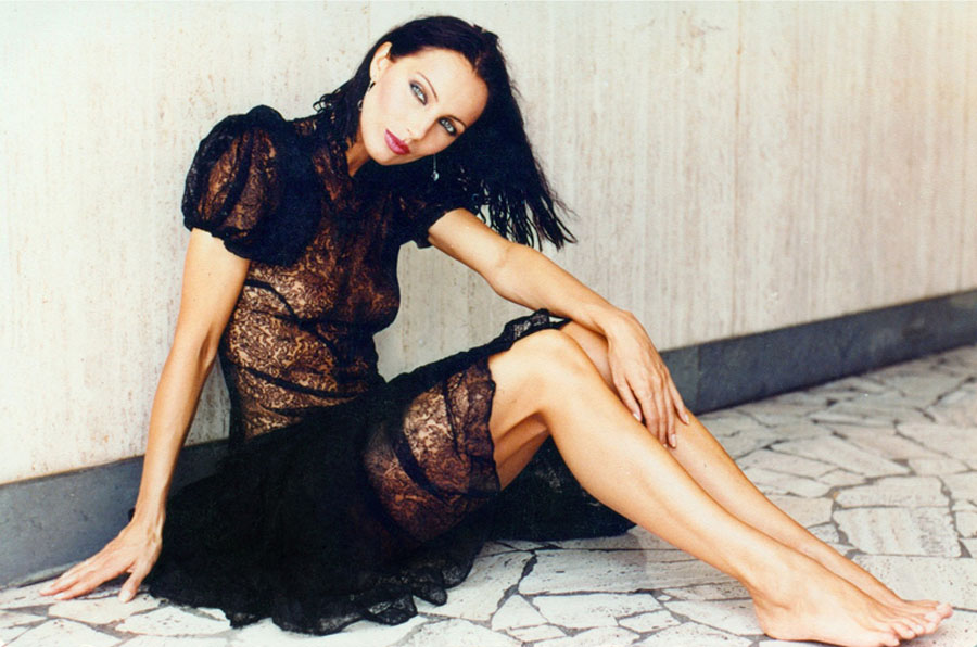 Lantos Piroska modell egész alakos képe